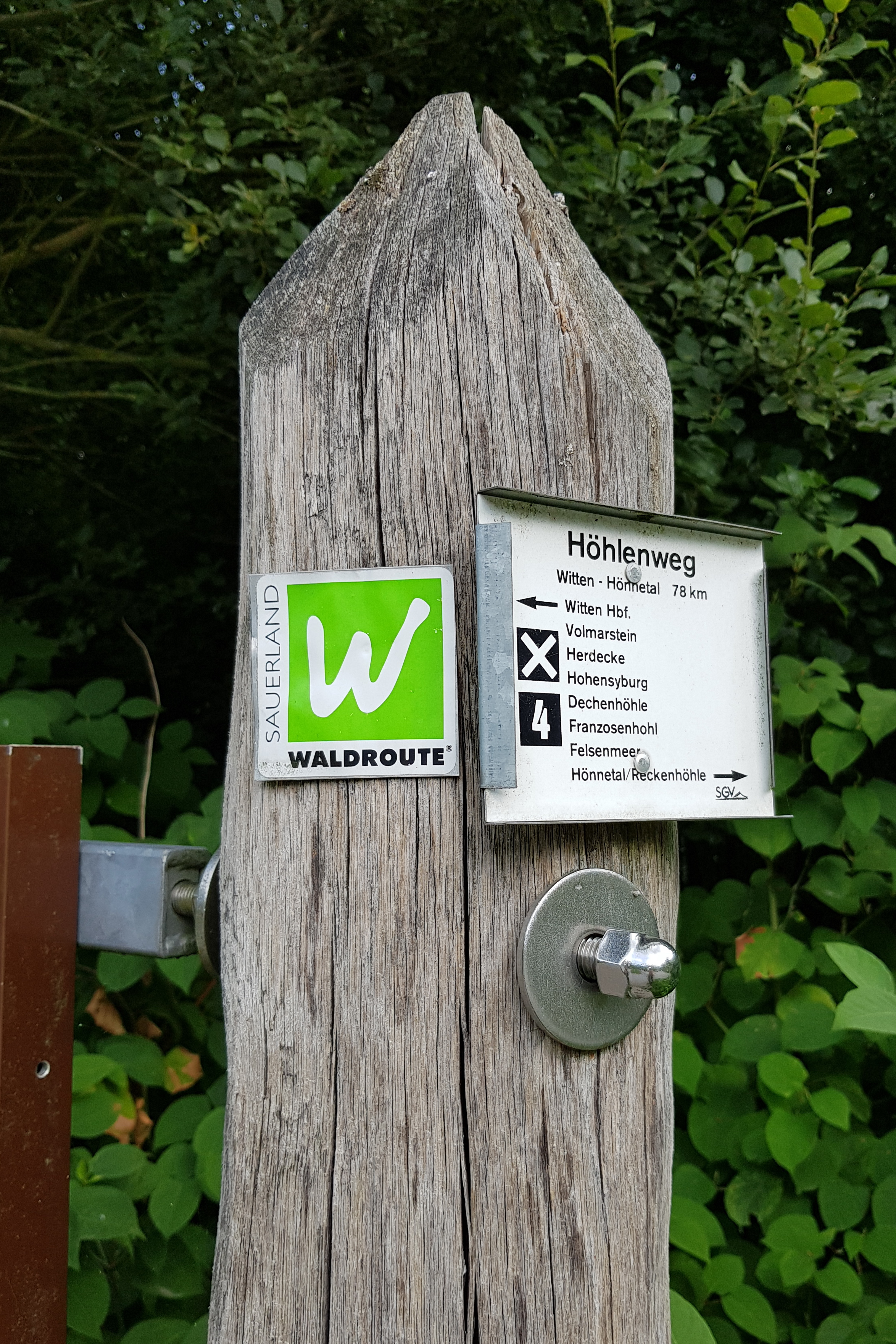 Wanderwegtafel des SGV am ehemaligen Höhlenweg in Hemer-Brockhausen, nahe Haus Bäingsen1.